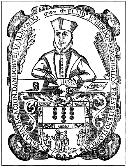 El marino y clérigo español Pedro Ordóñez de Cevallos en el frontispicio de la edición original de su libro Viaje del Mundo